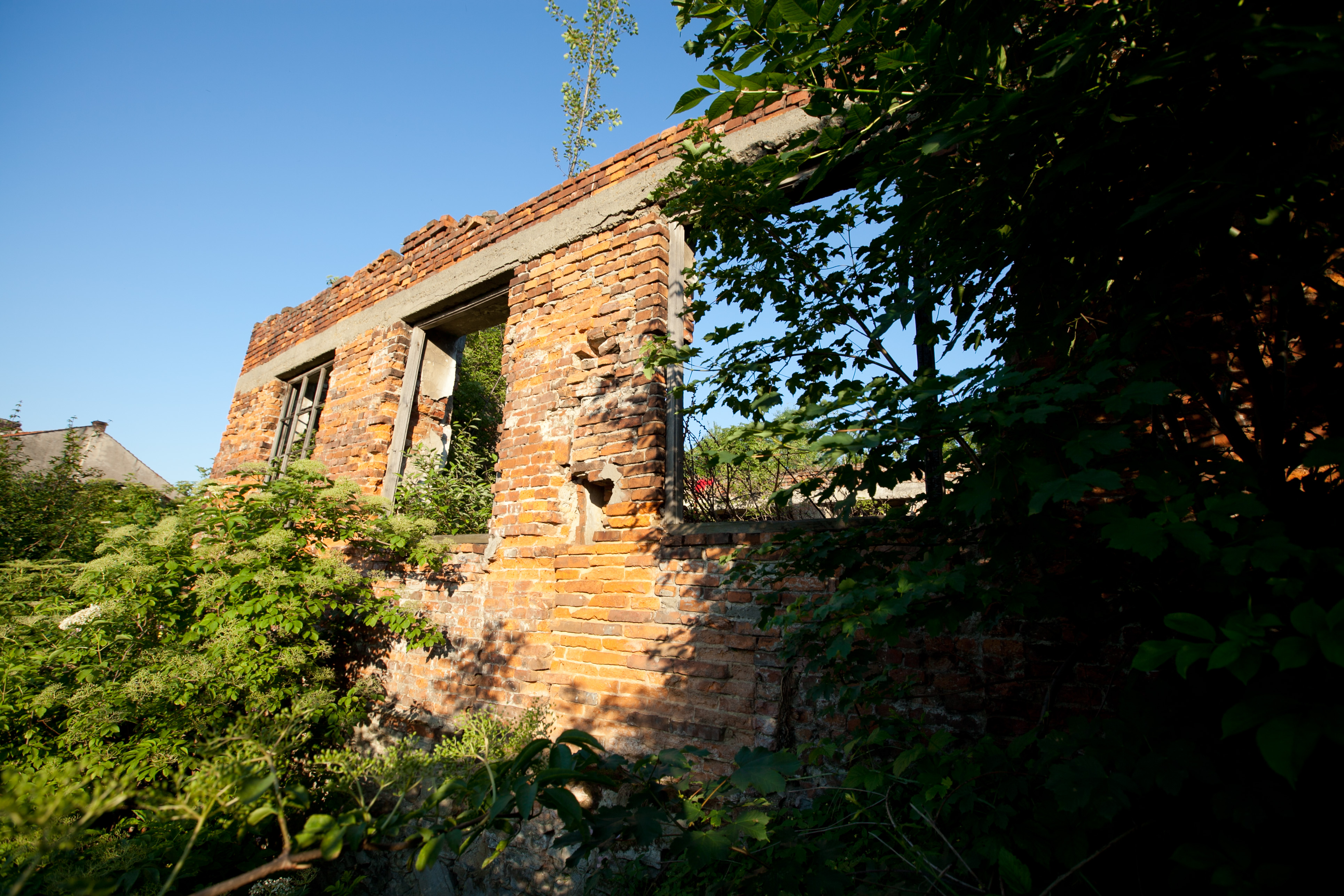 Ruiny Synagogi w Wieliczce przy ul. Wiejskiej, dz. Klasno, ściana zachodnia